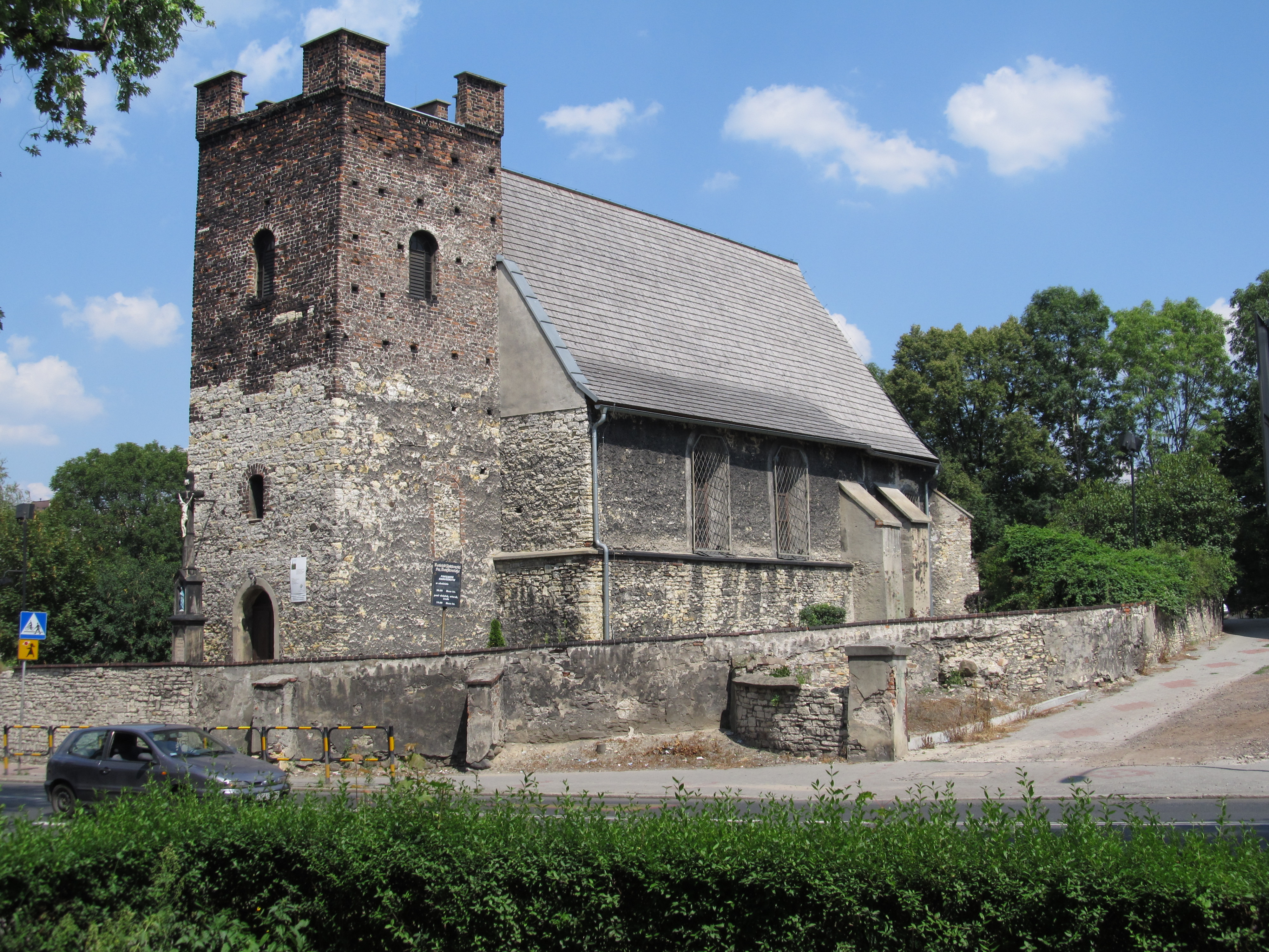 Kościół pw. świętego Bartłomieja (stary); Gliwice, ul. Toszecka 36